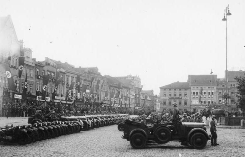 Heeres-Filmstelle. Bildabt. Einmarsch in das Sudetenland. Paradeaufstellung auf dem Marktplatz. German troops in parade formation on the market place of Leitmeritz. 12.10.1938 Leitmeritz, Sudetenland